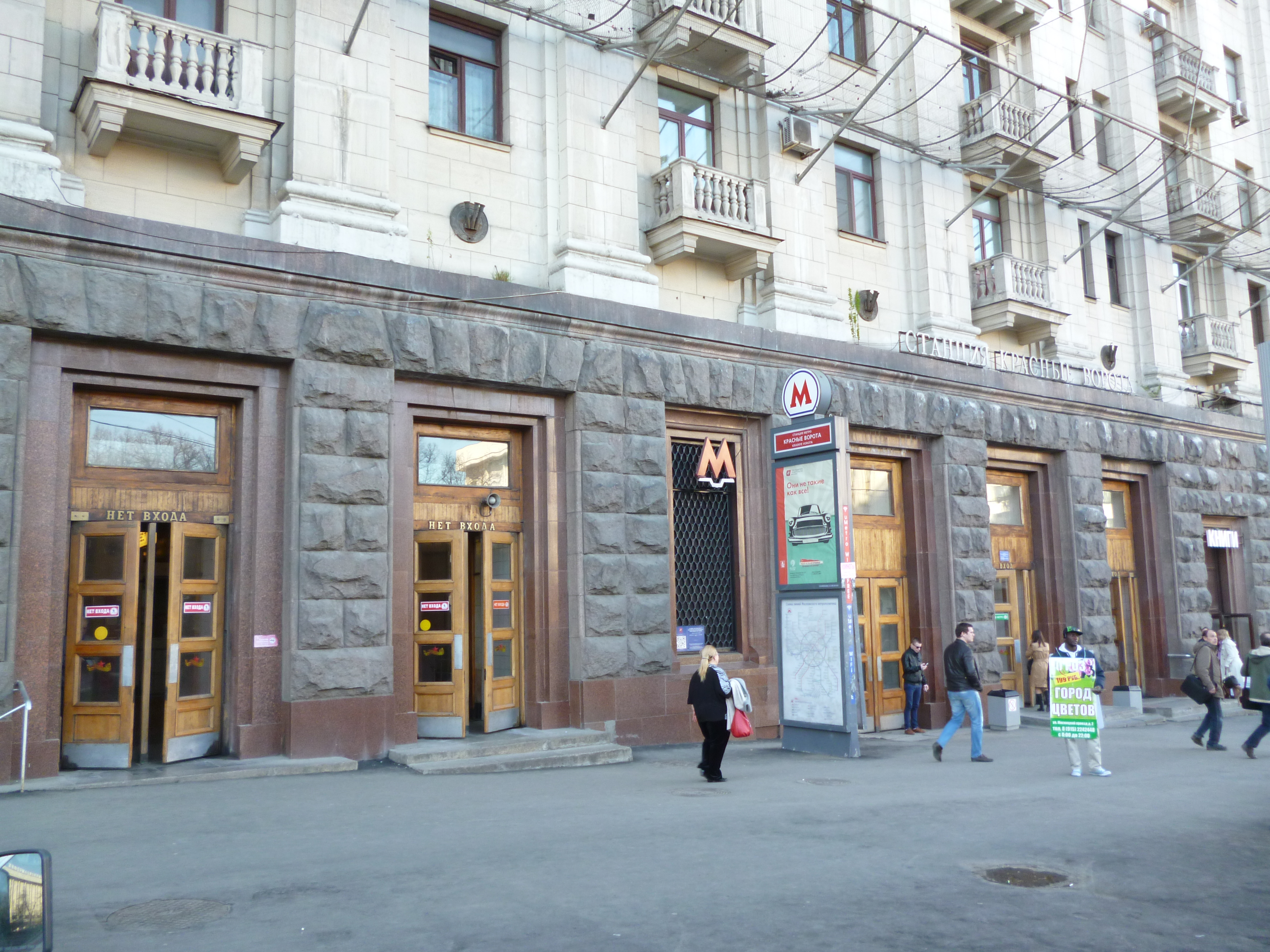 Вход на станцию метро "Красные ворота", встроенный в высотное здание.